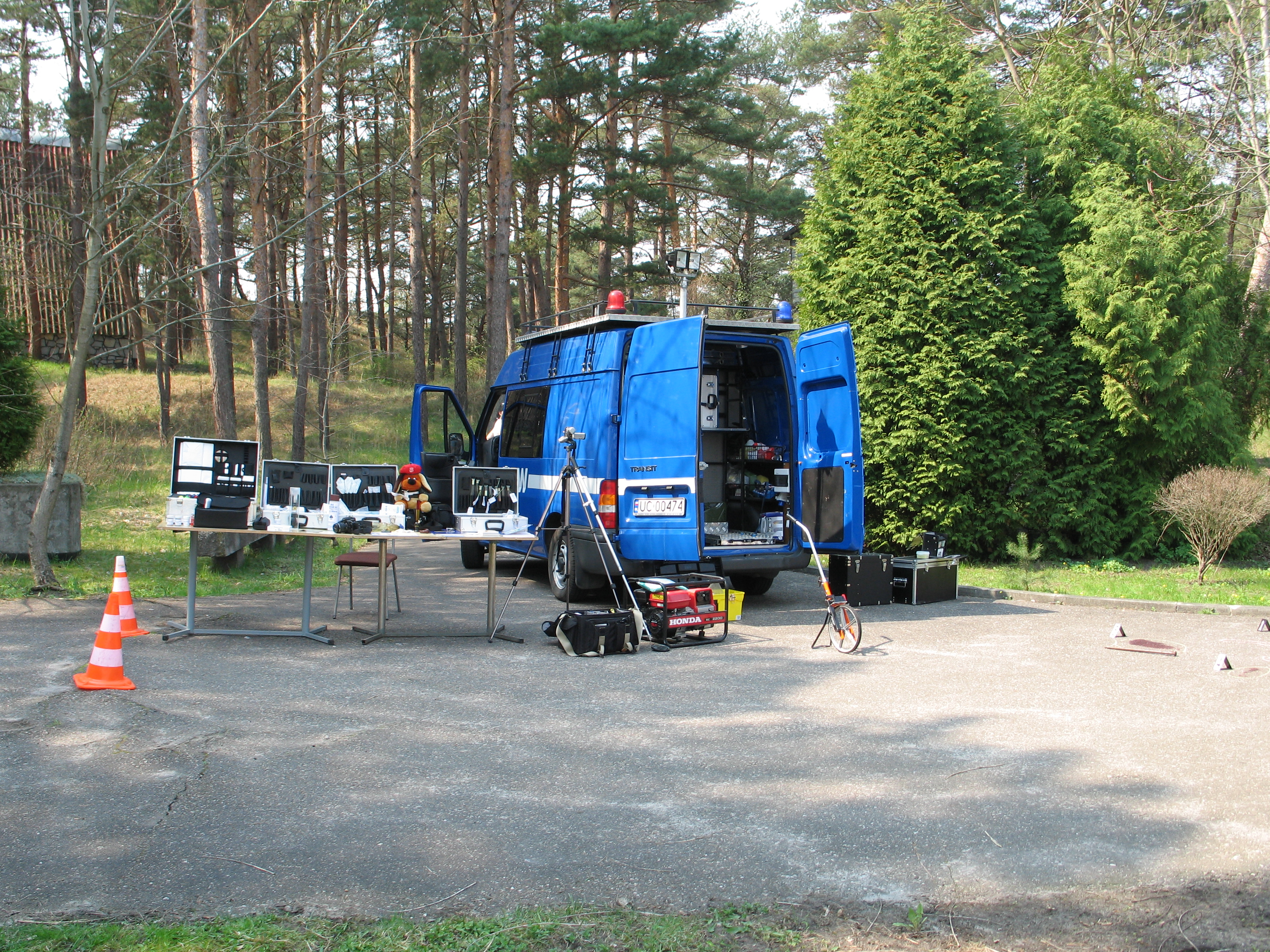 Ford Transit ED-2